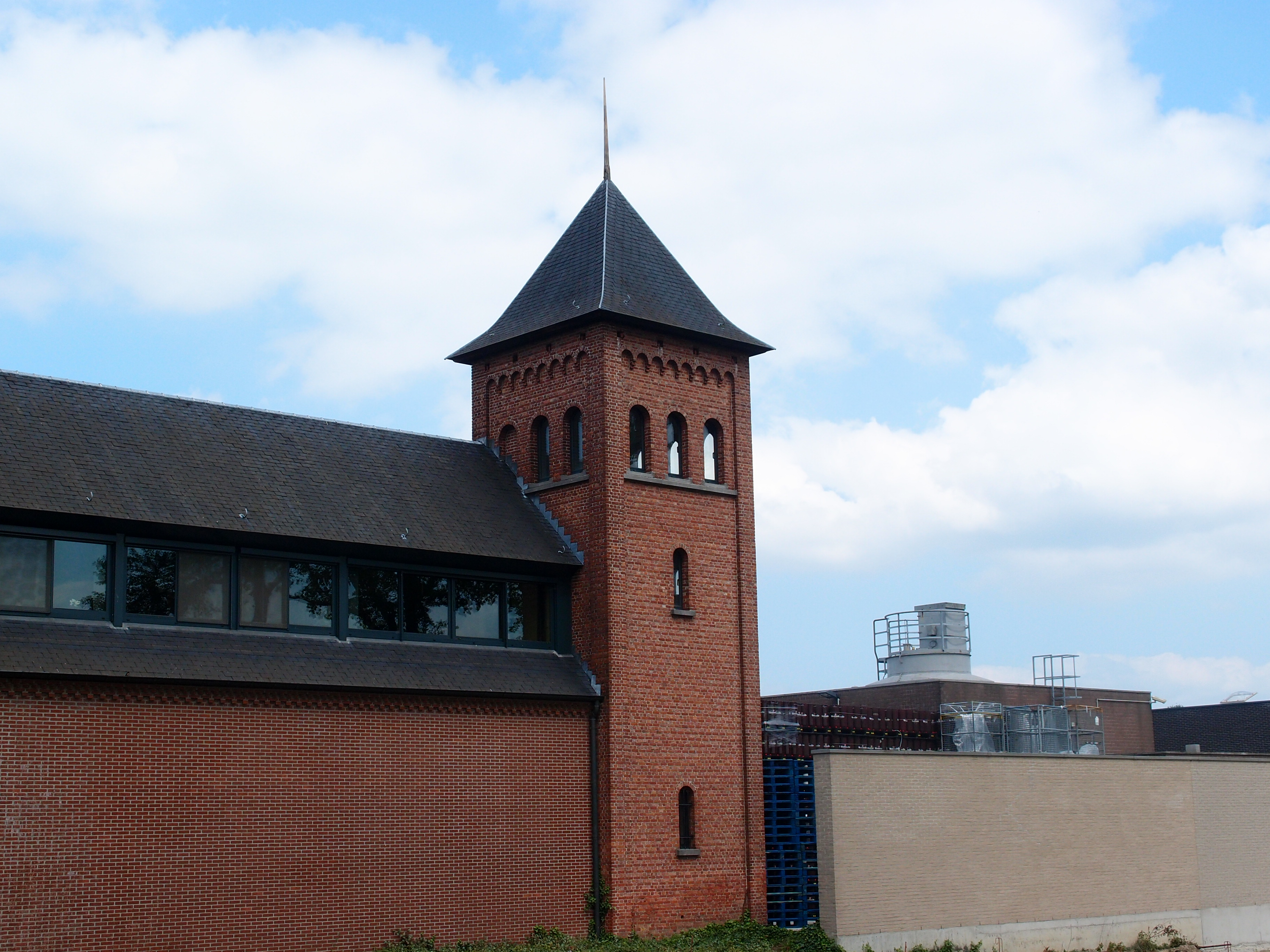 Teilansicht der belg. Trappistenbrauerei Westmalle Datum: 31.05.2014 Urheber: M. Pfeiffer alias Benutzer:Gordito1869 Quelle: Privates Fotoarchiv des Urhebers